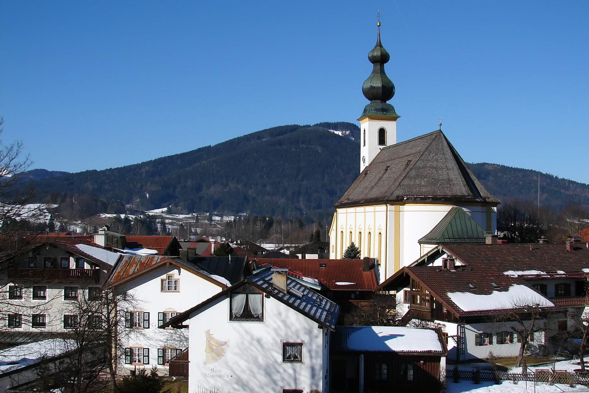 Inzell ist eine Gemeinde und anerkannter Luftkurort im südlichen Landkreis Traunstein, Regierungsbezirk Oberbayern.